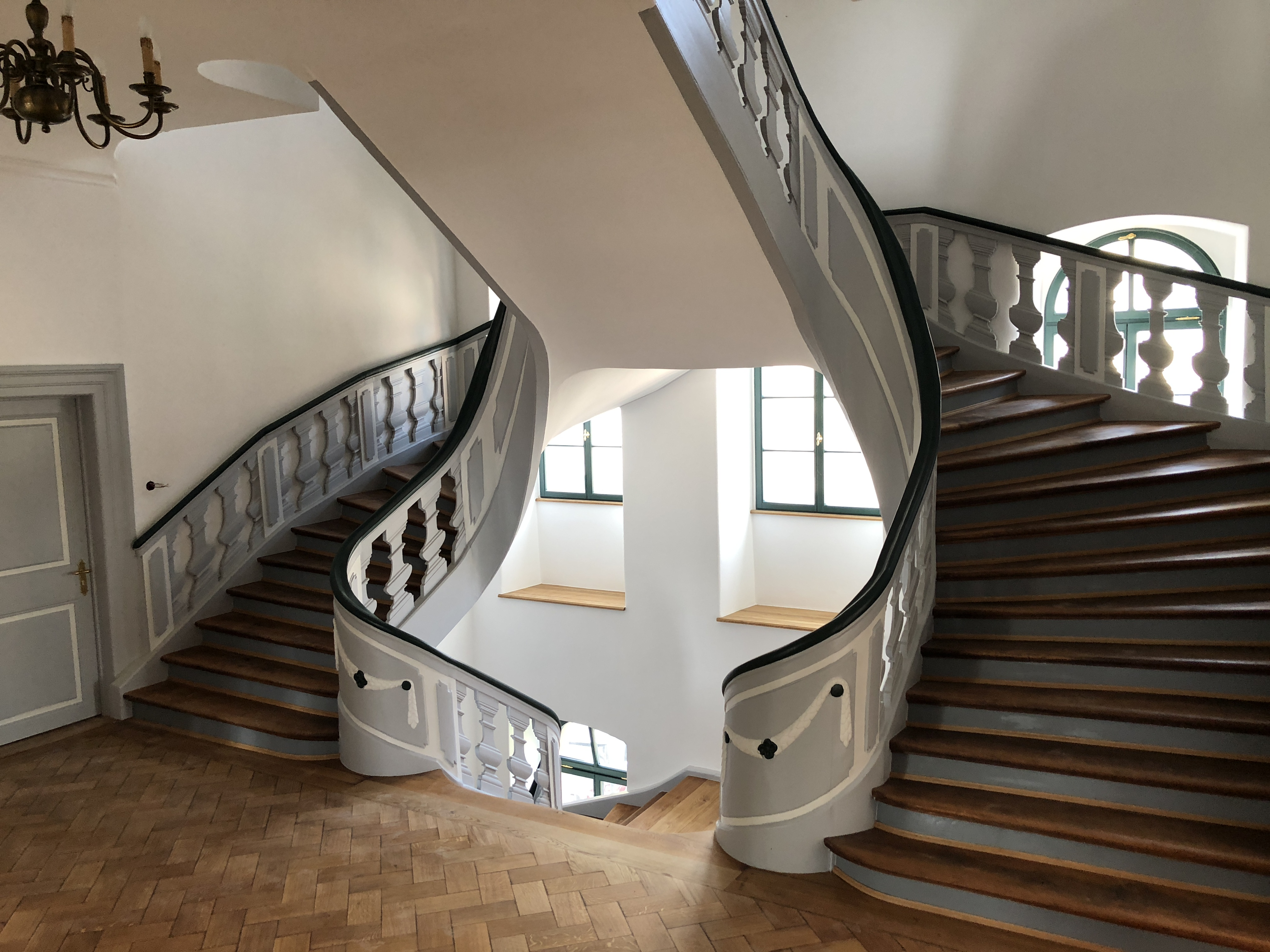 Treppenhaus Neues Schloss, nach der Sanierung